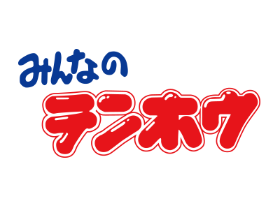 Logo des Restaurants Tenhô